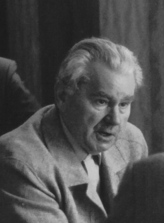 Peter Kniest in Andernach in 1984(or 1985/86?)